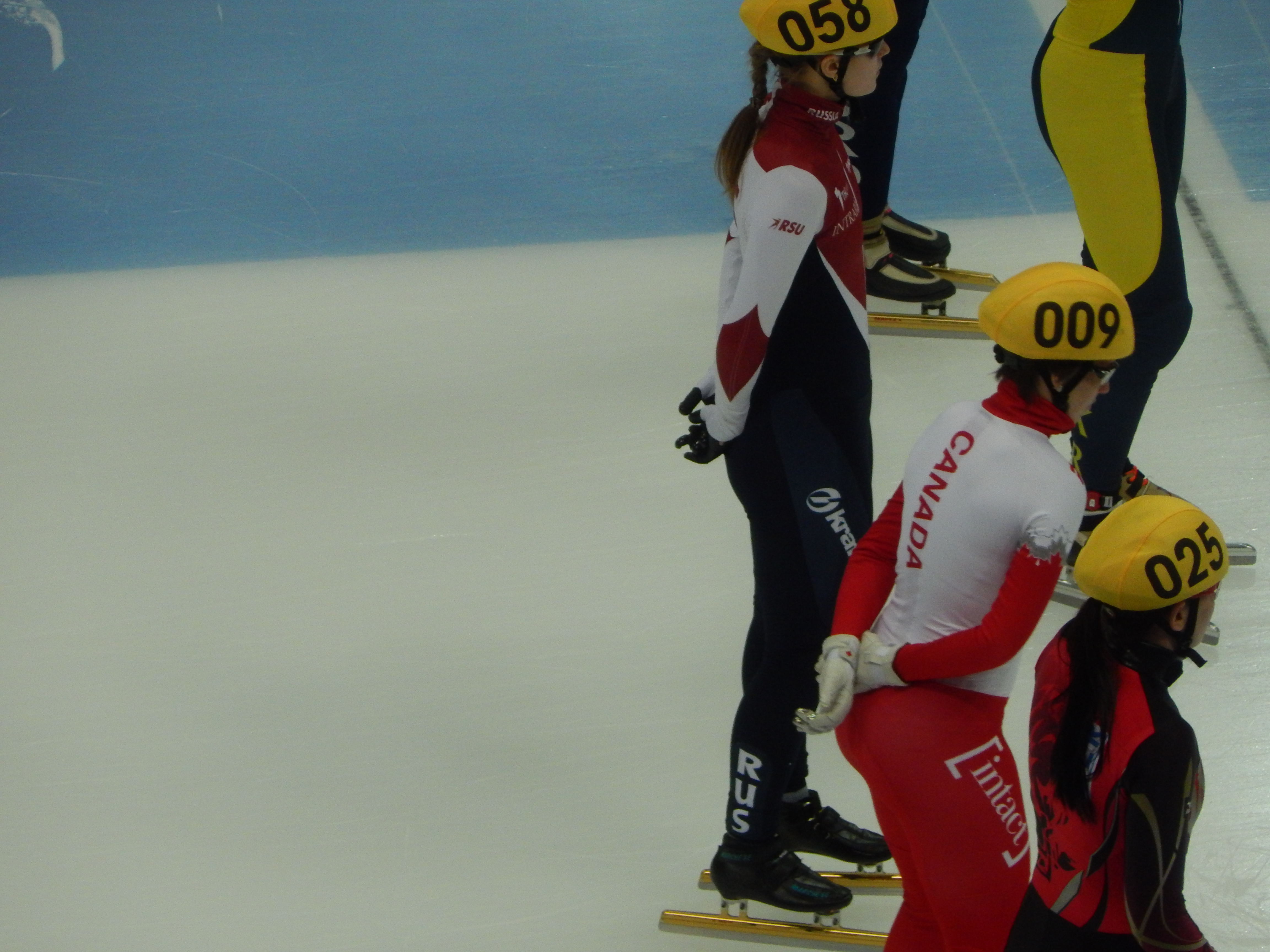 Чемпионат мира по шорт-треку 2015 в Москве Квалификационный раунд, 10 забег, 1000 м, Женщины